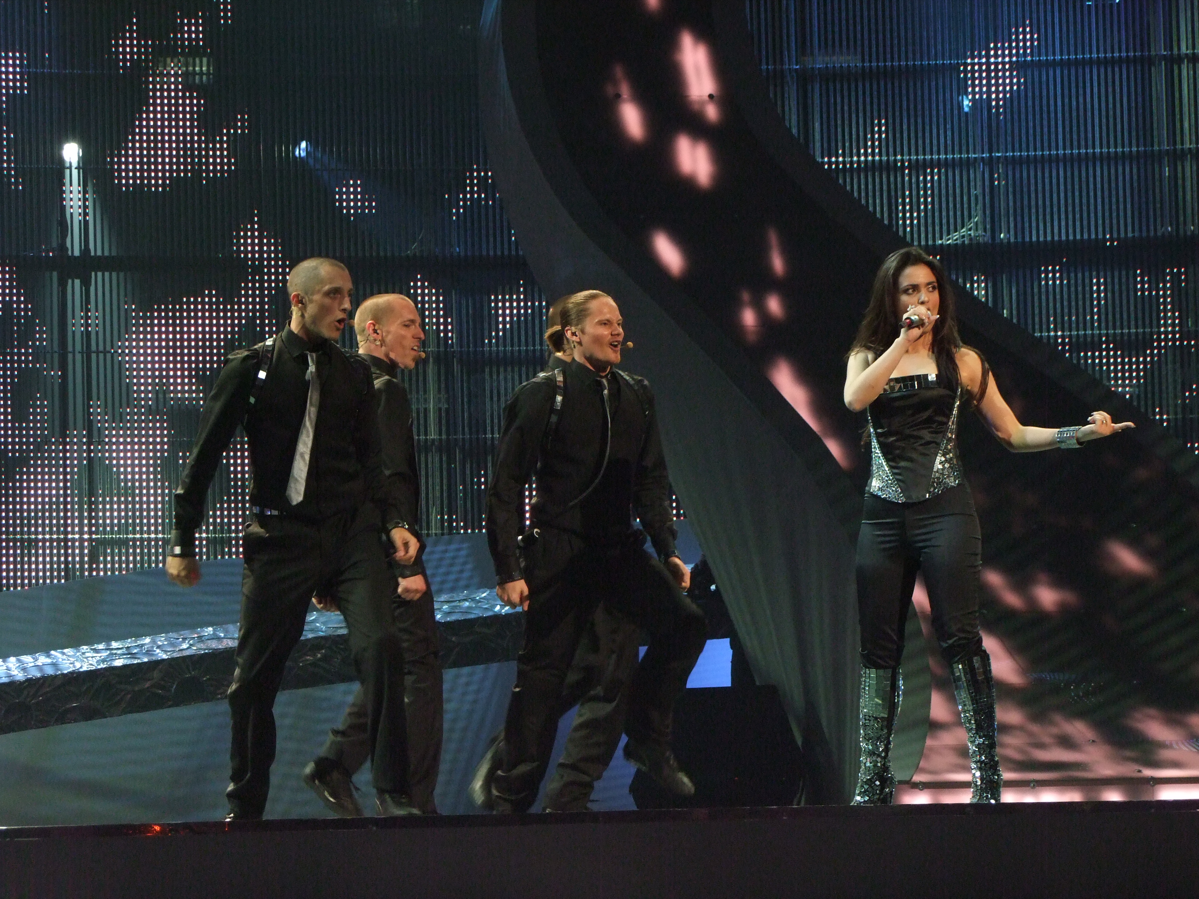 Semifinal 2 Eurovision 2008